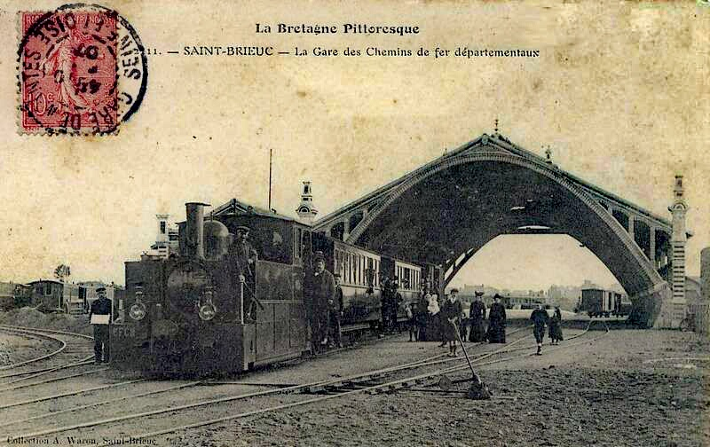 Locomotive Blanc-Misseron à la gare Centrale de Saint-Brieuc (Chemins de Fer des Côtes-du-Nord).